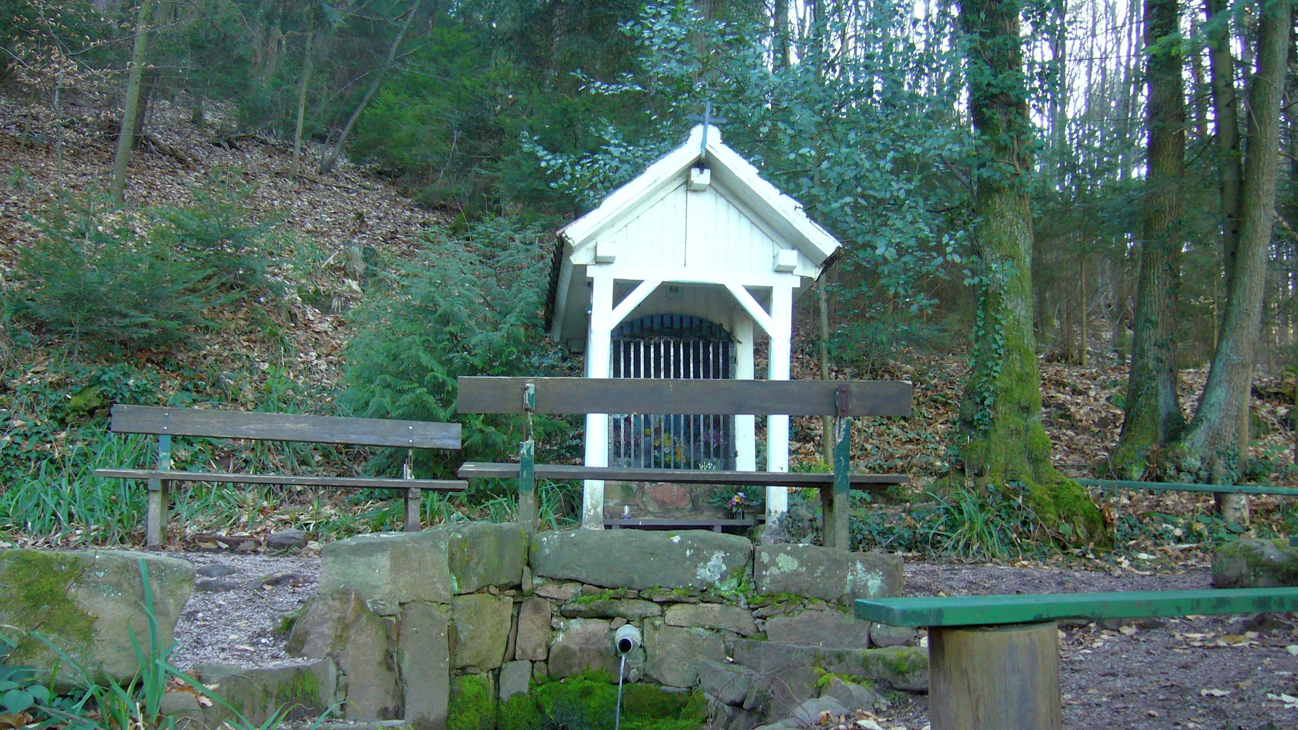 Oratoire de la source situé dans les bois de Neubois